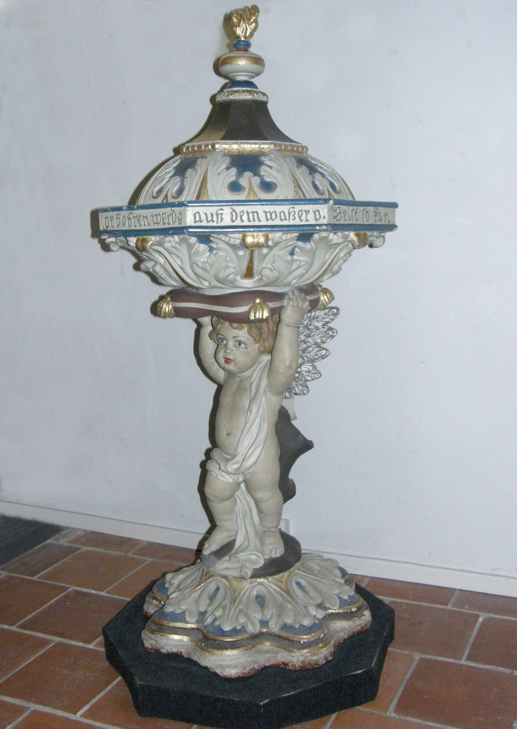 Berlin-Kaulsdorf, Jesuskirche: Taufe